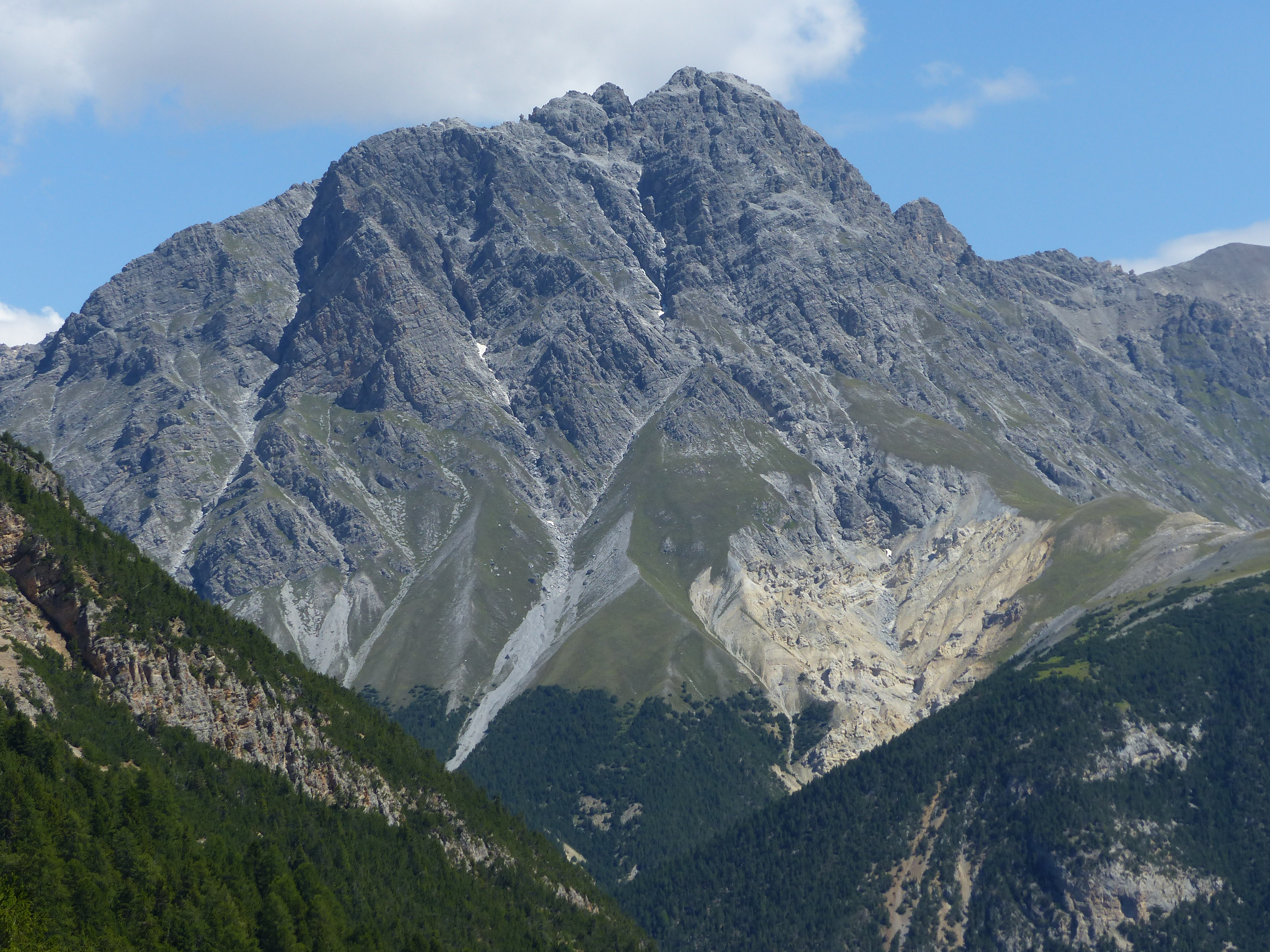 Piz Madlain (fotografiert von der Alp Tavrü)